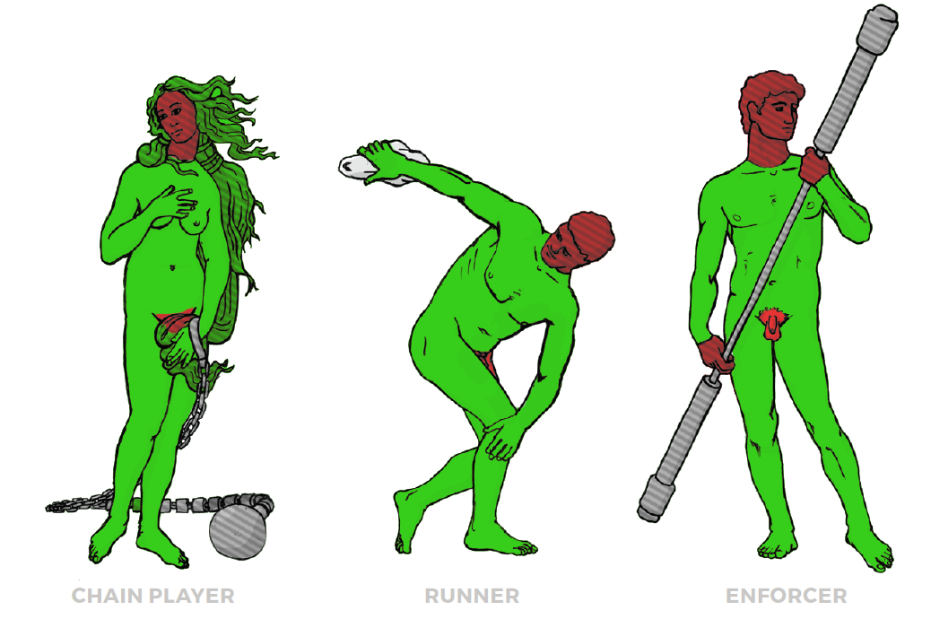 Zone de touche Valides